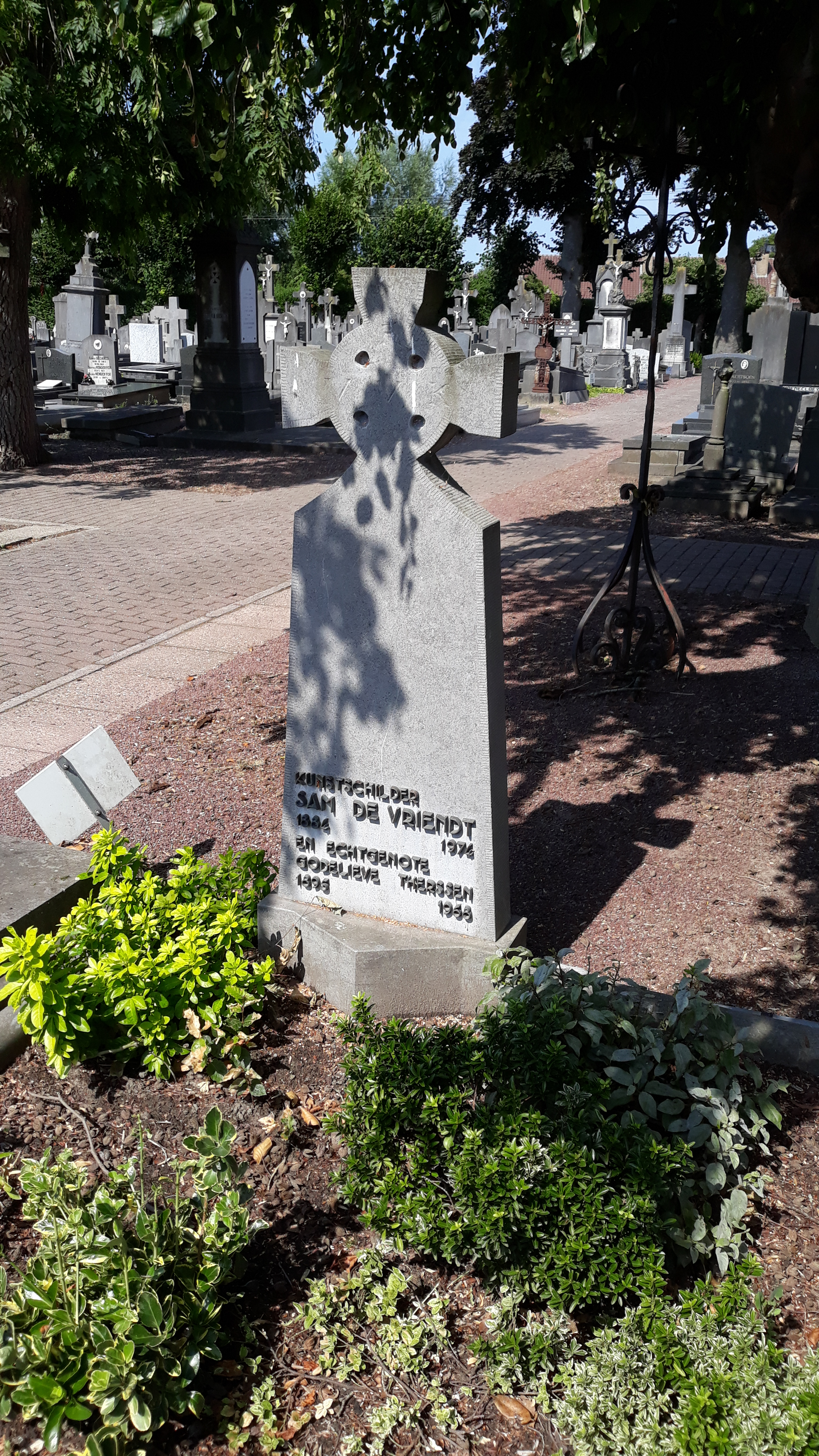 Das Grab des flämischen Malers Sam de Vriendt und seiner Ehefrau Godelive Therssen auf dem Friedhof von Veurne (West-Vlaanderen, Belgien).